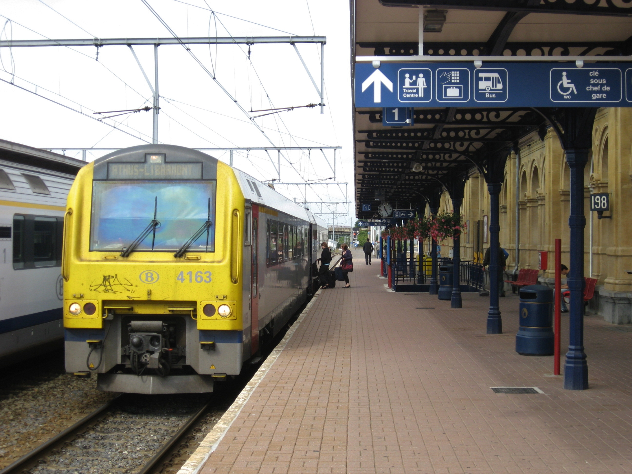 Dieseltreinstel type 41 voor de nieuwe dienst naar Athus, Virton en Bertrix.